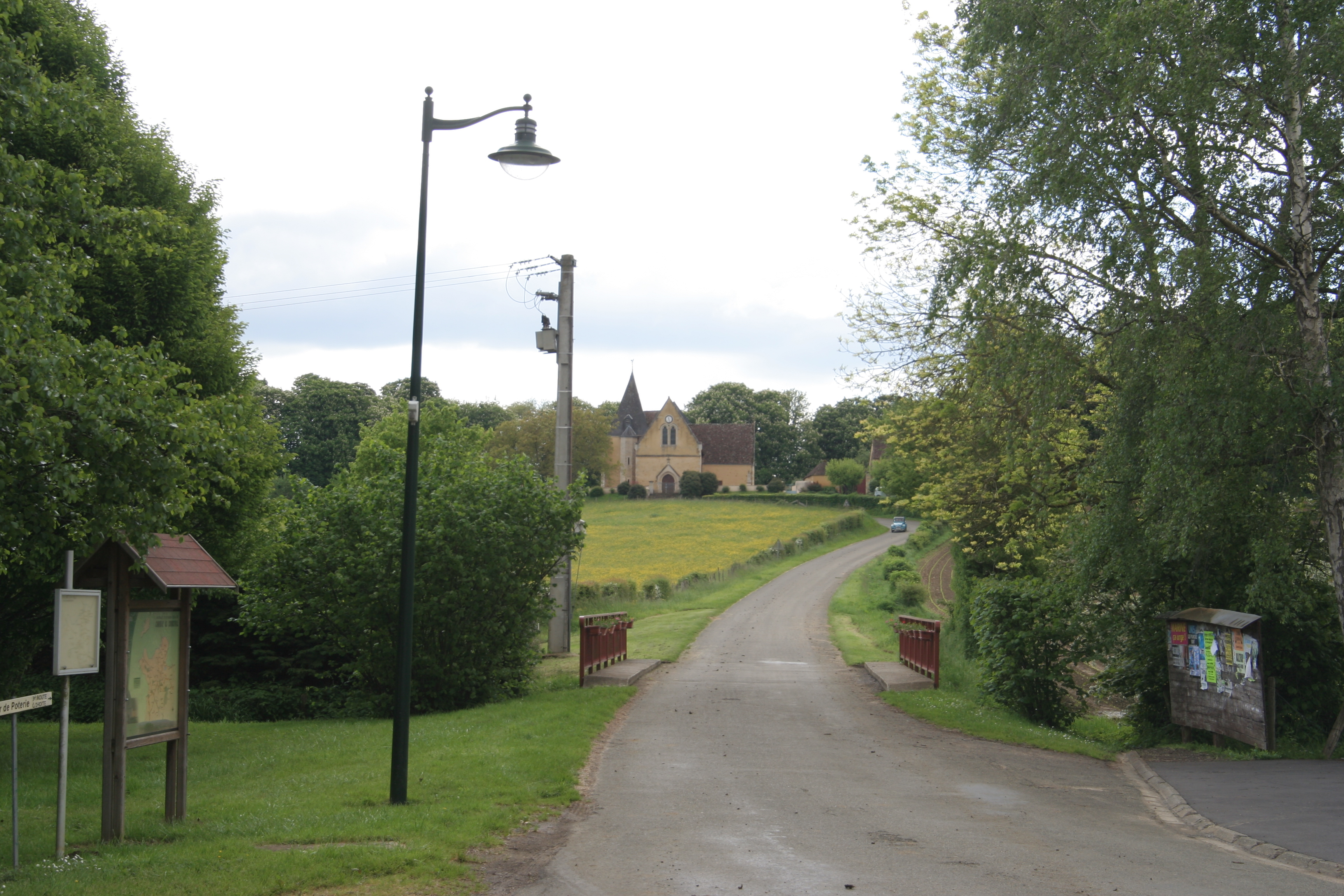 Bourg de Courcival.